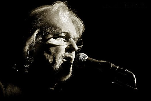 Aldo Tagliapietra (Le Orme) in concerto, 2007